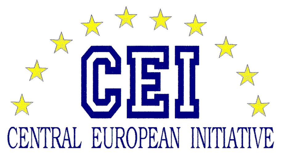 лого